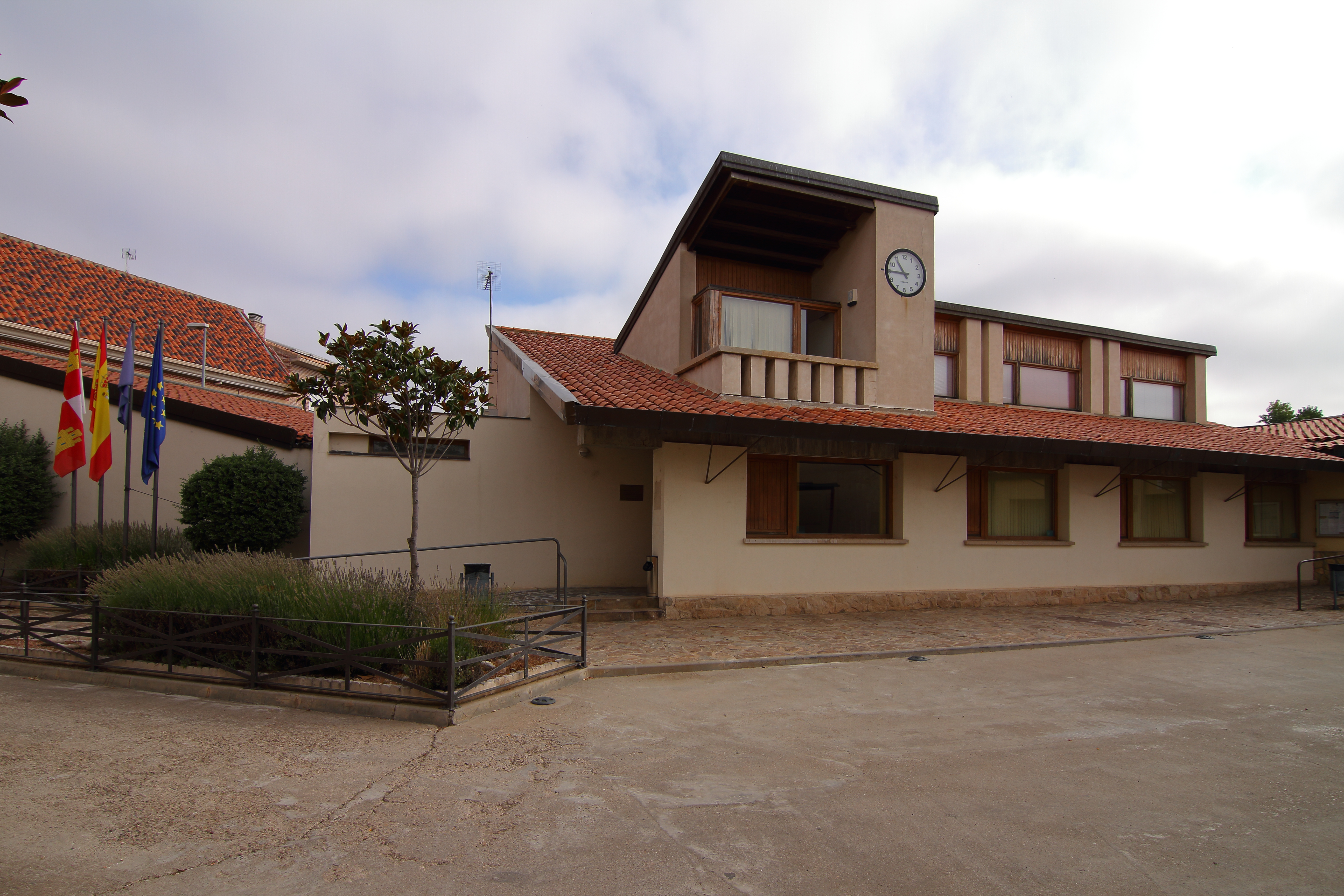 Ayuntamiento de Aldeatejada